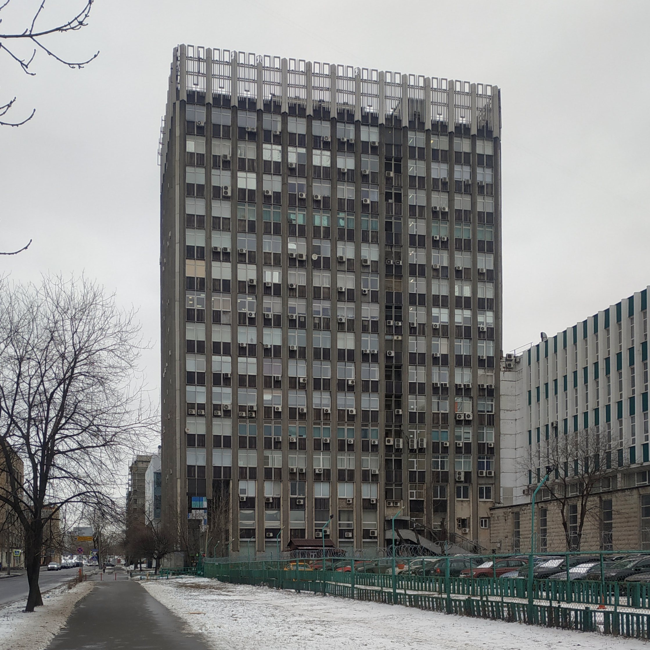 Здание НПО Техномаш